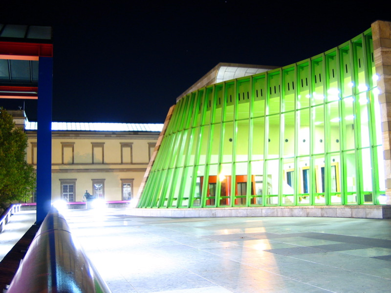 The Staatsgalerie Stuttgart at Night